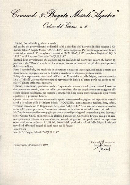 Comando 3° Brigata Missili Aquileia Ordine del Giorno n° 6 del 30.11.1991